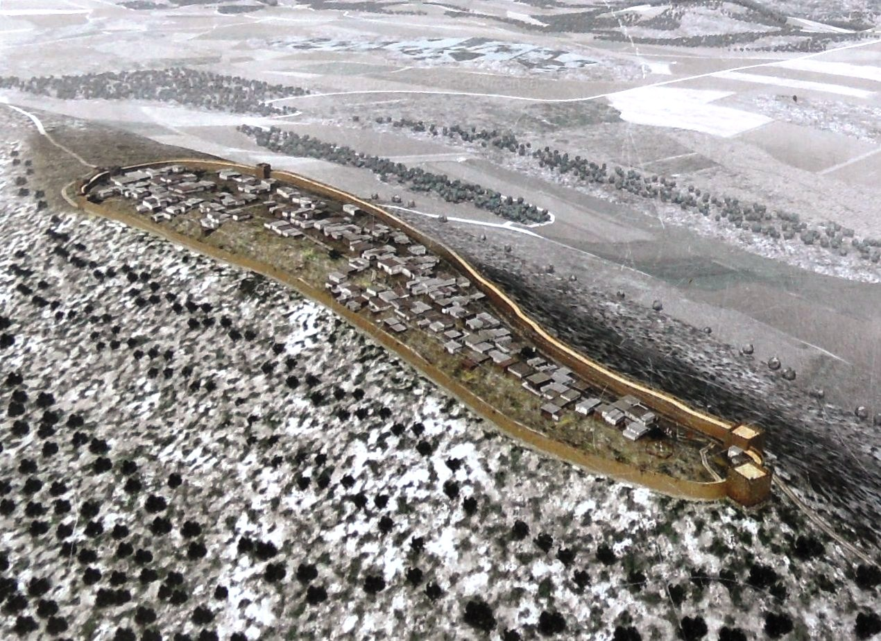 Reproducció ideal del poblat.